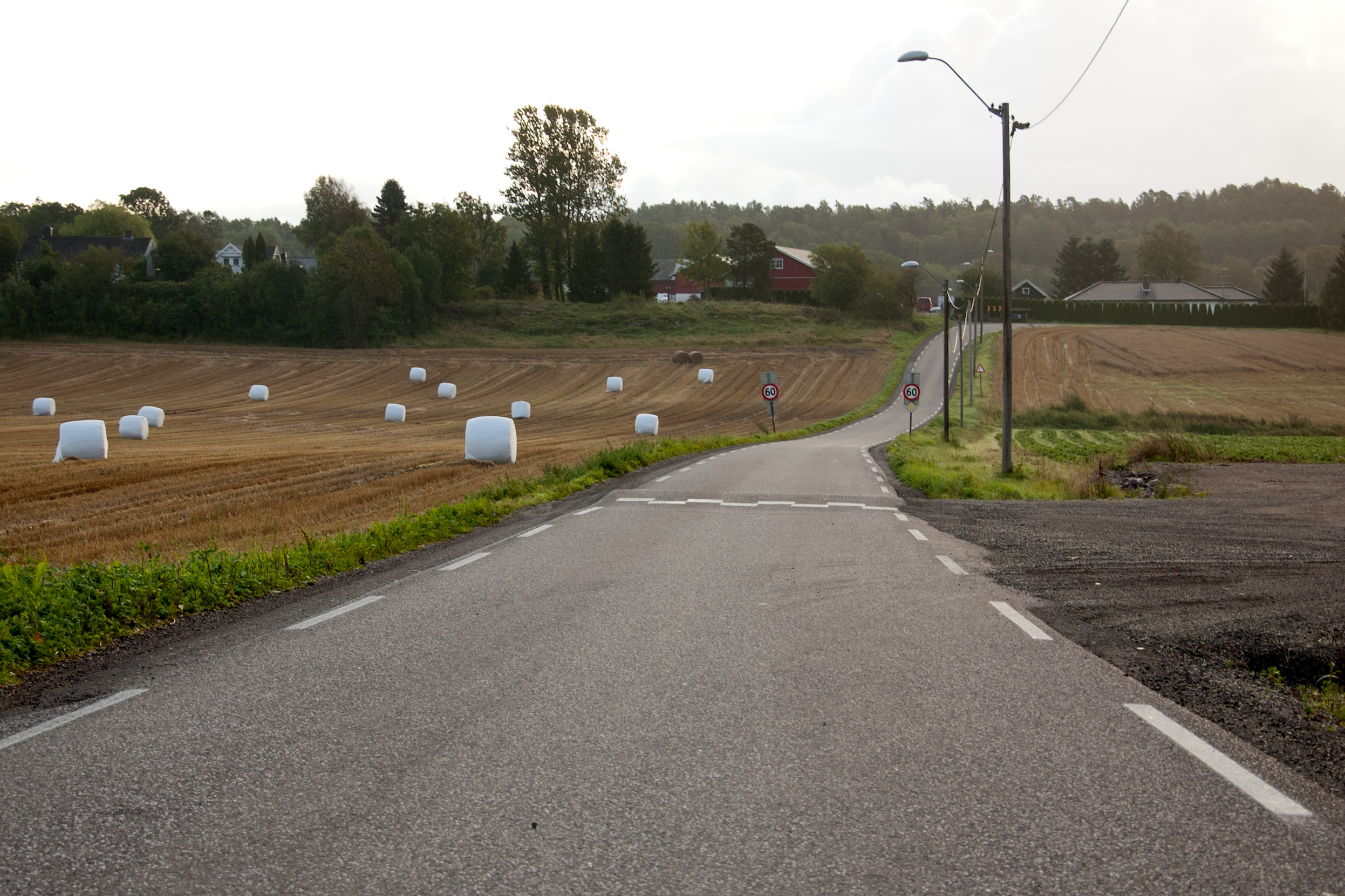 Fylkesvei 535 Bøgata i Tønsberg, Vestfold